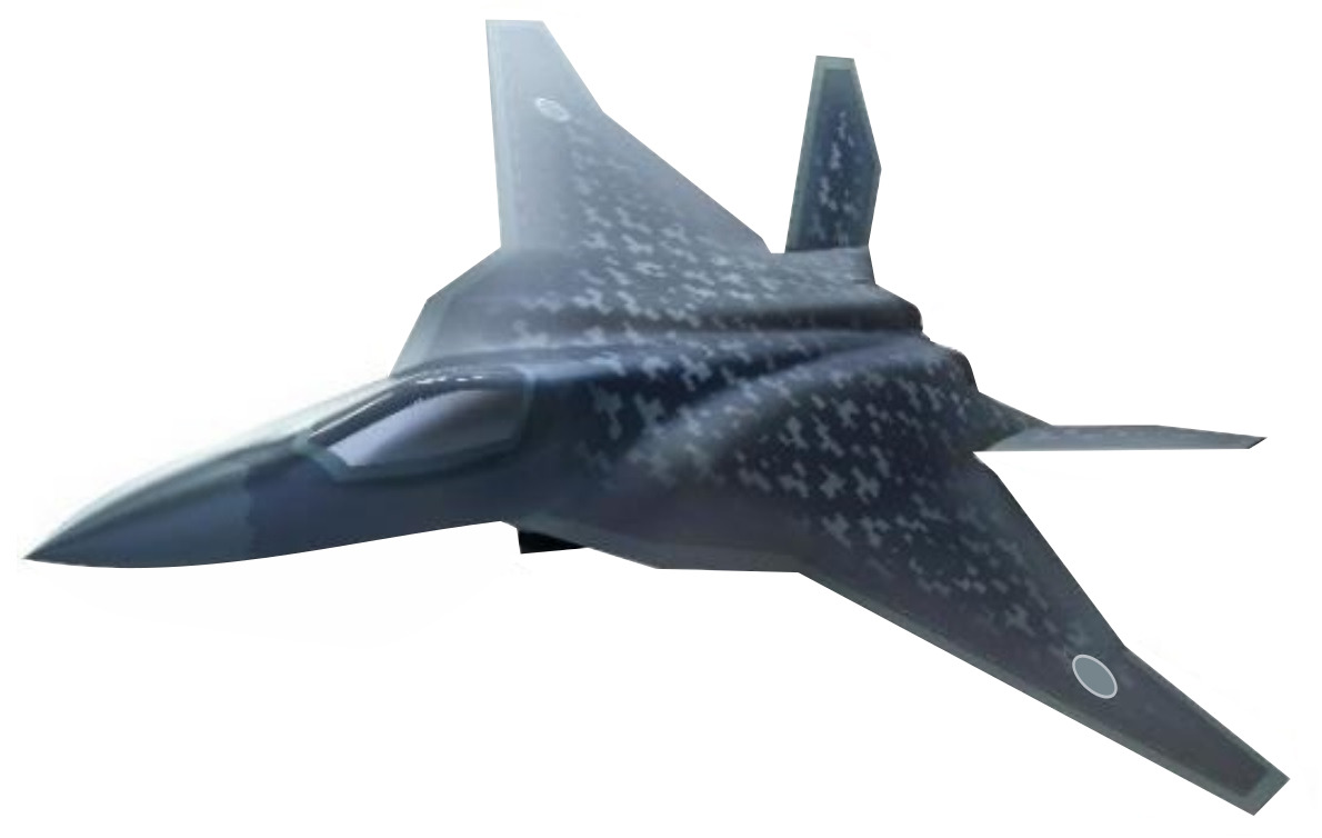 次期戦闘機のイメージ。防衛省の資料より写真のみ抜取